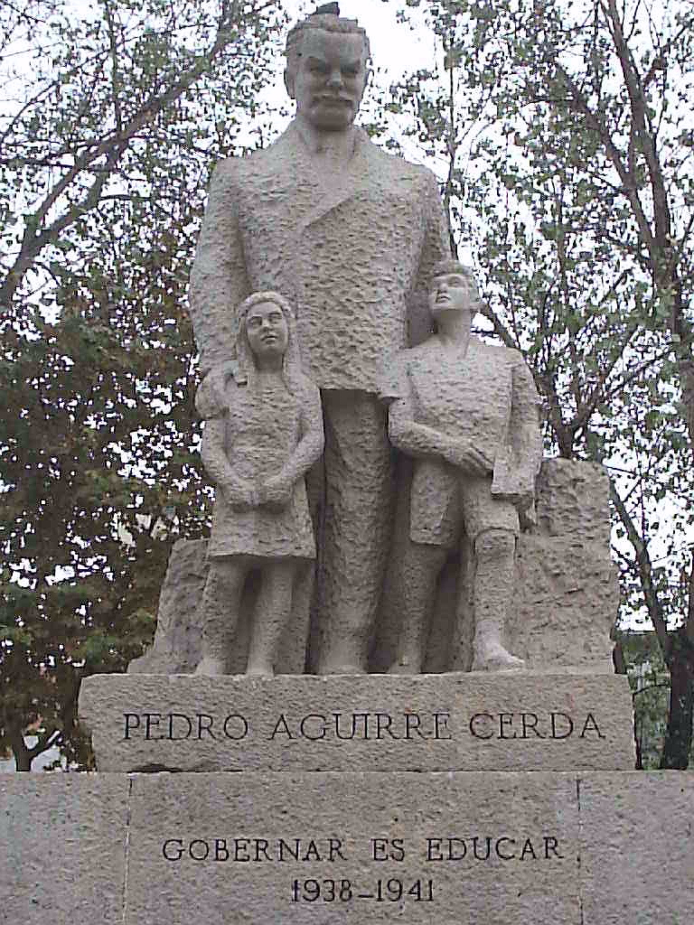 Estatua de Pedro Aguirre Cerda, Presidente de Chile (1938-1941)